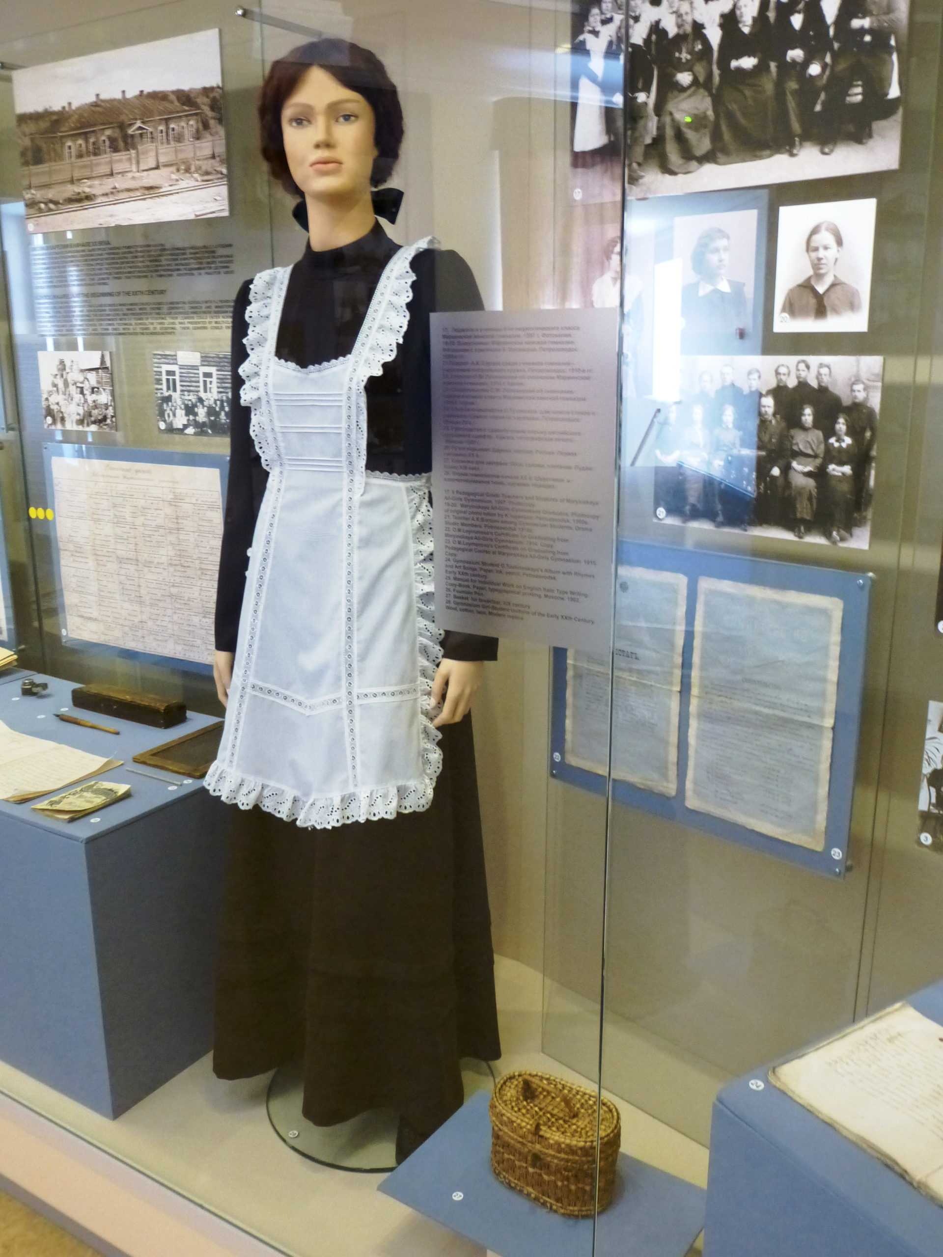 Реконструкция формы гимназистки Мариинской женской гимназии Петрозаводска.(источник - Национальный музей Республики Карелия)